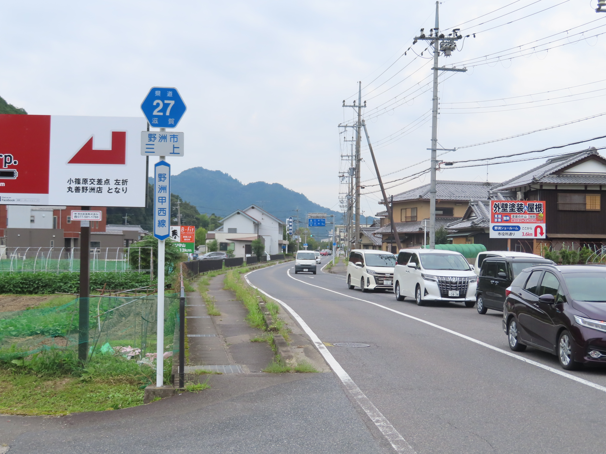 滋賀県道27号野洲甲西線。御上神社前交差点より東を臨む。